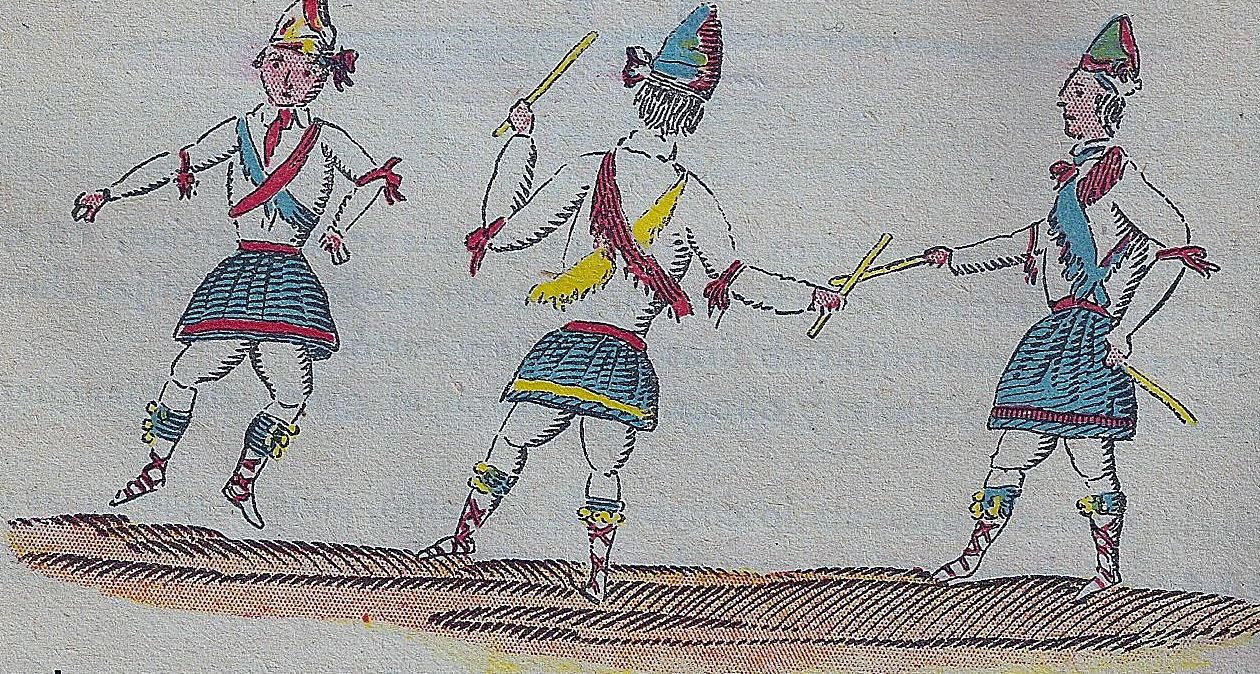 Dibuix d'Andreu de Bofarull del Ball de Valencians i Bastoners, abans del 1890